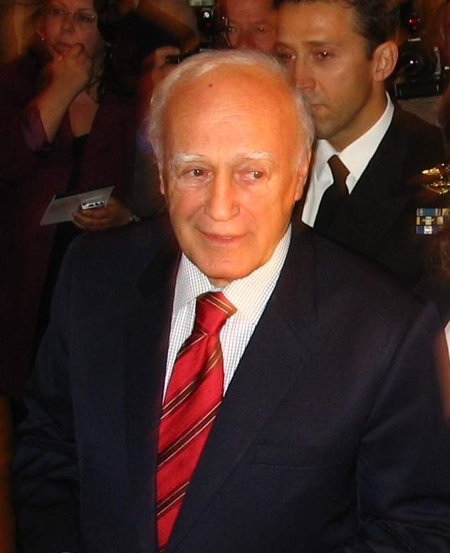 Karolos Pappoulias, greek president